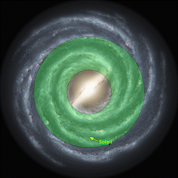 Schéma présentant la zone habitable galactique.